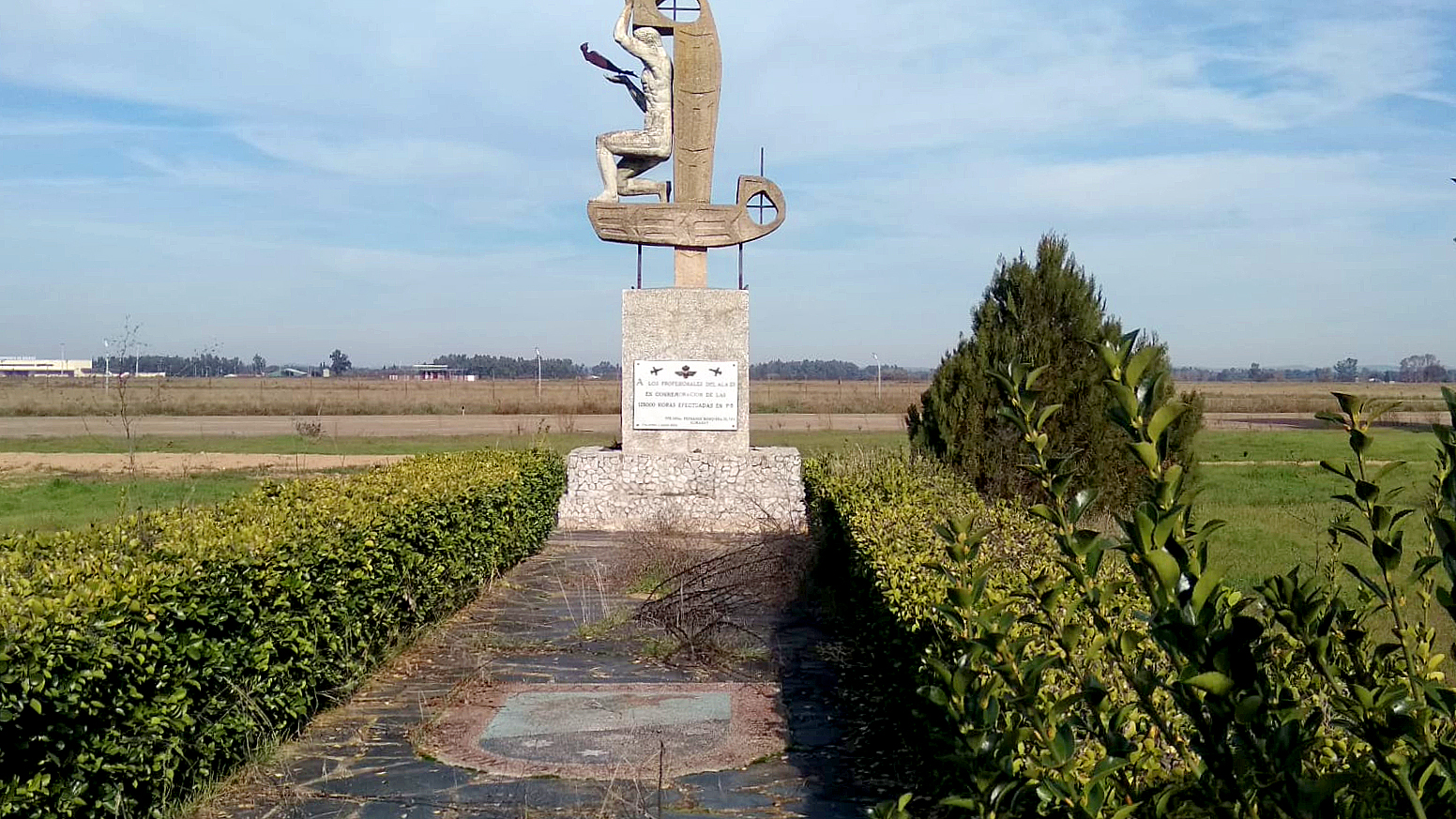 Vista general del monumento conmemorativo de las cien mil horas de vuelo. Al fondo, panorámica de la Base Aérea de Talavera la Real (Badajoz).